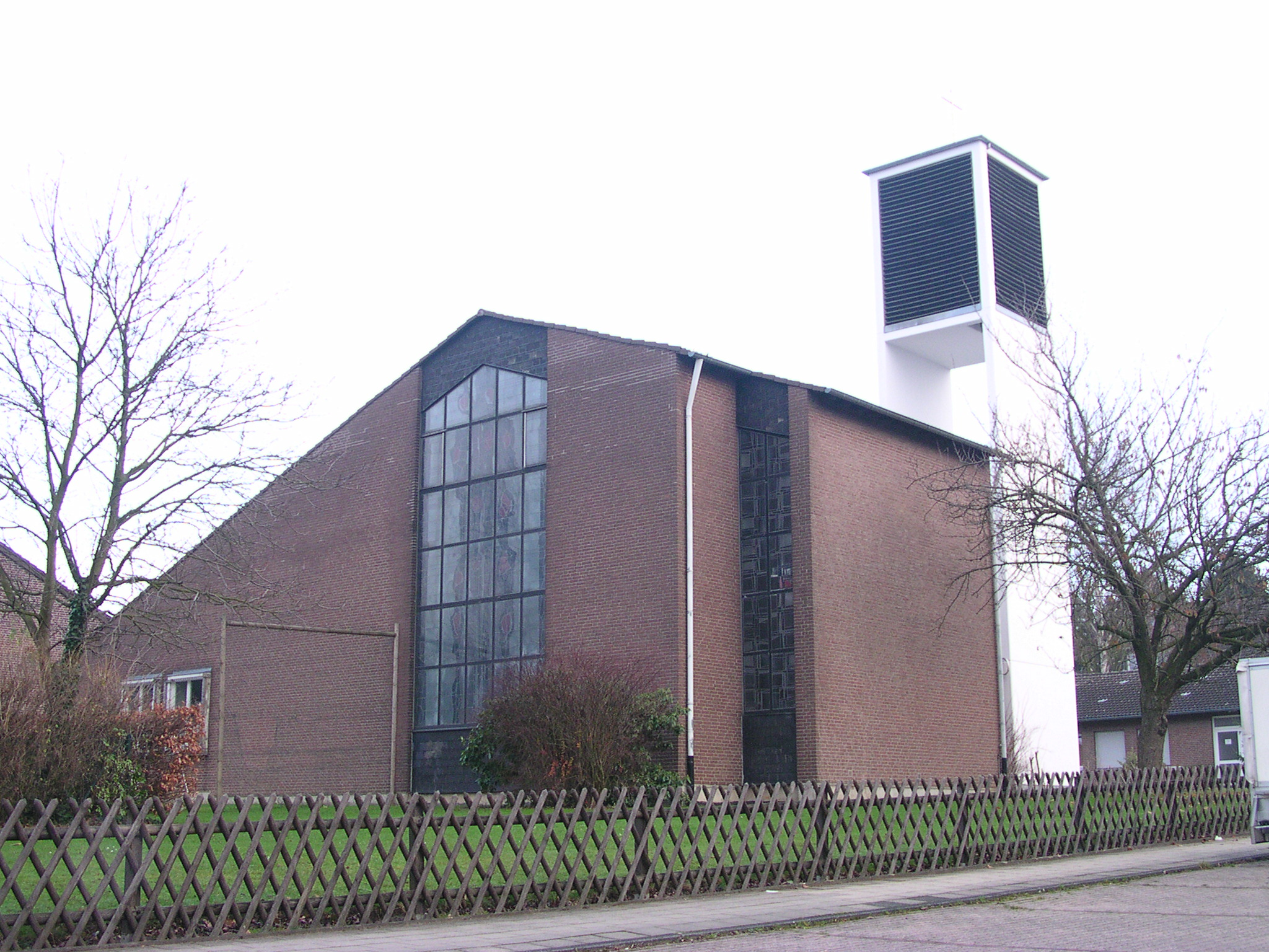 evangelische Kirche in Aachen Eilendorf